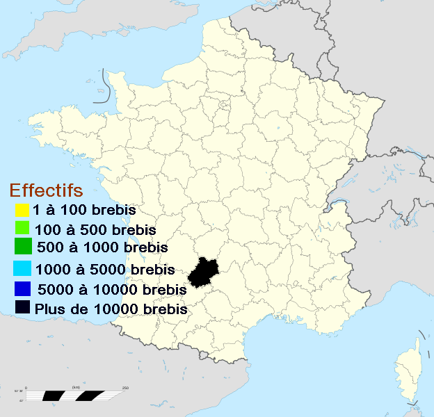 Répartition des élevages de troupeaux de brebis soumis au contrôle des performances, d'après un document de l'Institut de L'élevage (France). Ces élevages sont concentrés dans le département du Lot